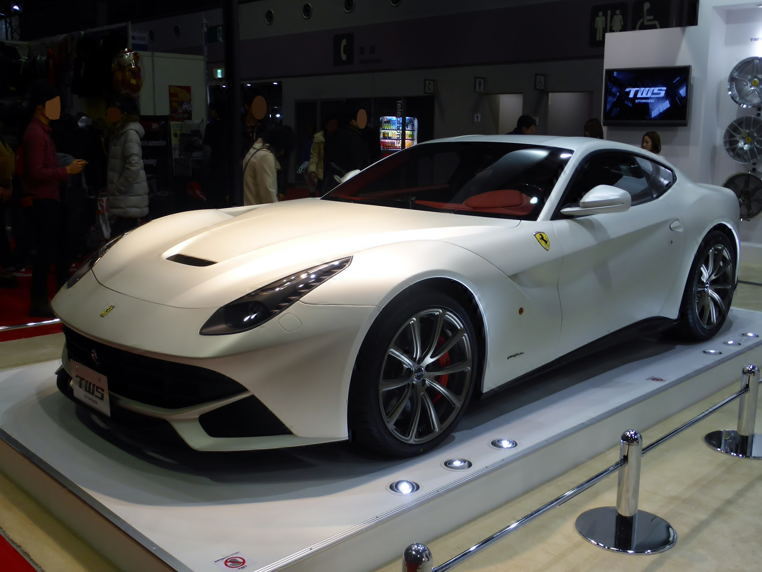 大阪モーターショー2013のTWSブースにおいてフェラーリ・F12ベルリネッタを撮影。